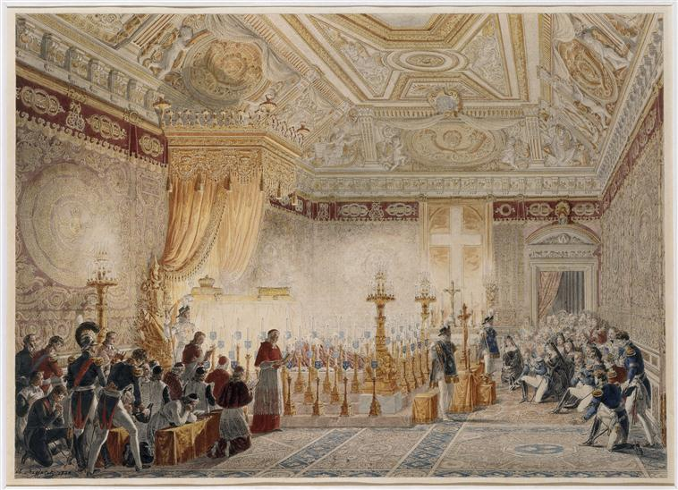 Chapelle ardente du roi Louis XVIII dans la salle du trône du palais des Tuileries, septembre 1824